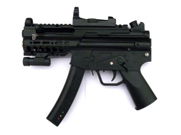 Mp5a3 zbraň pro Solarsoft.